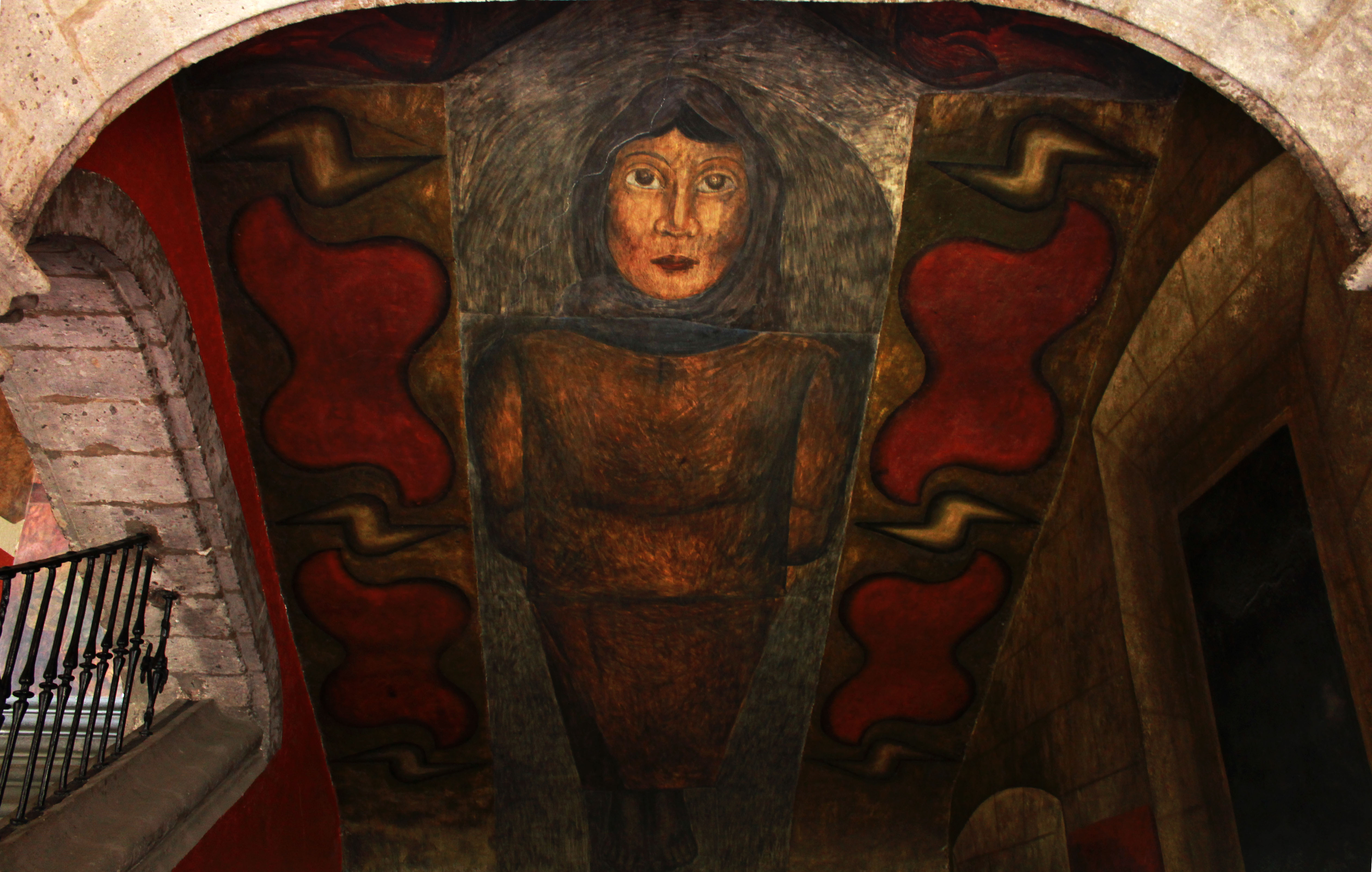 Muralismo en el Patio Chico del Antiguo Colegio de San Ildefonso